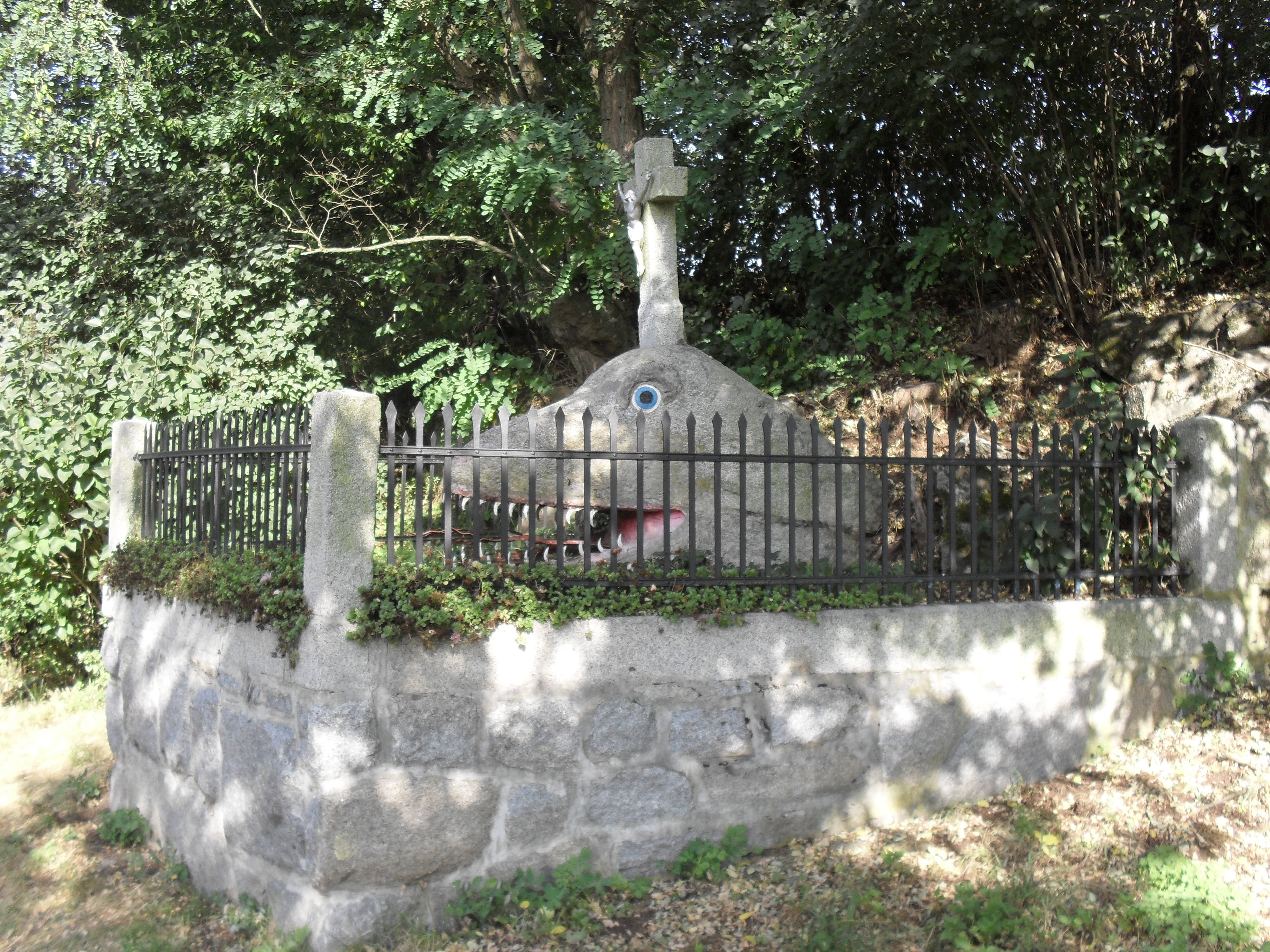 Fotografie pořízena v obci Maňovice.